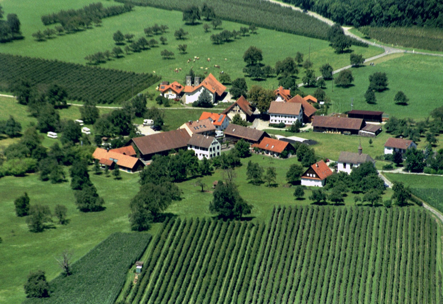 Deutschland - Baden-Württemberg - Bodenseekreis - Kressbronn am Bodensee - Ortsteil Tunau: Luftaufnahme aus Zeppelin NT, Blickrichtung Norden